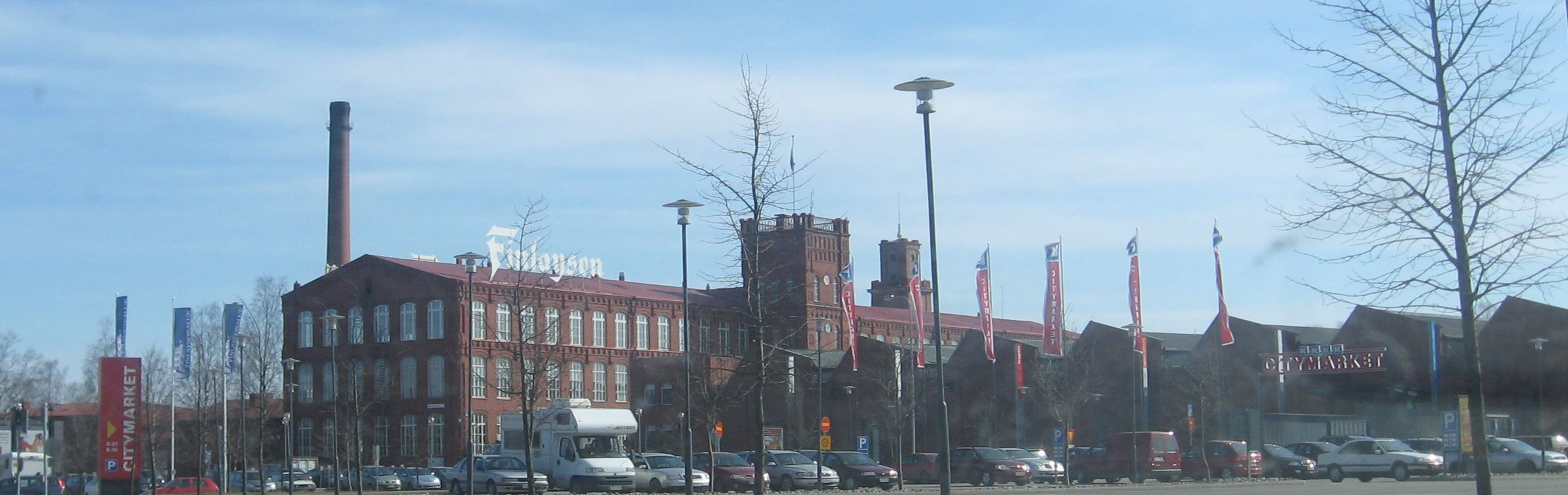 Finlayson-Forssan vanhaa rakennuskantaa Forssassa.